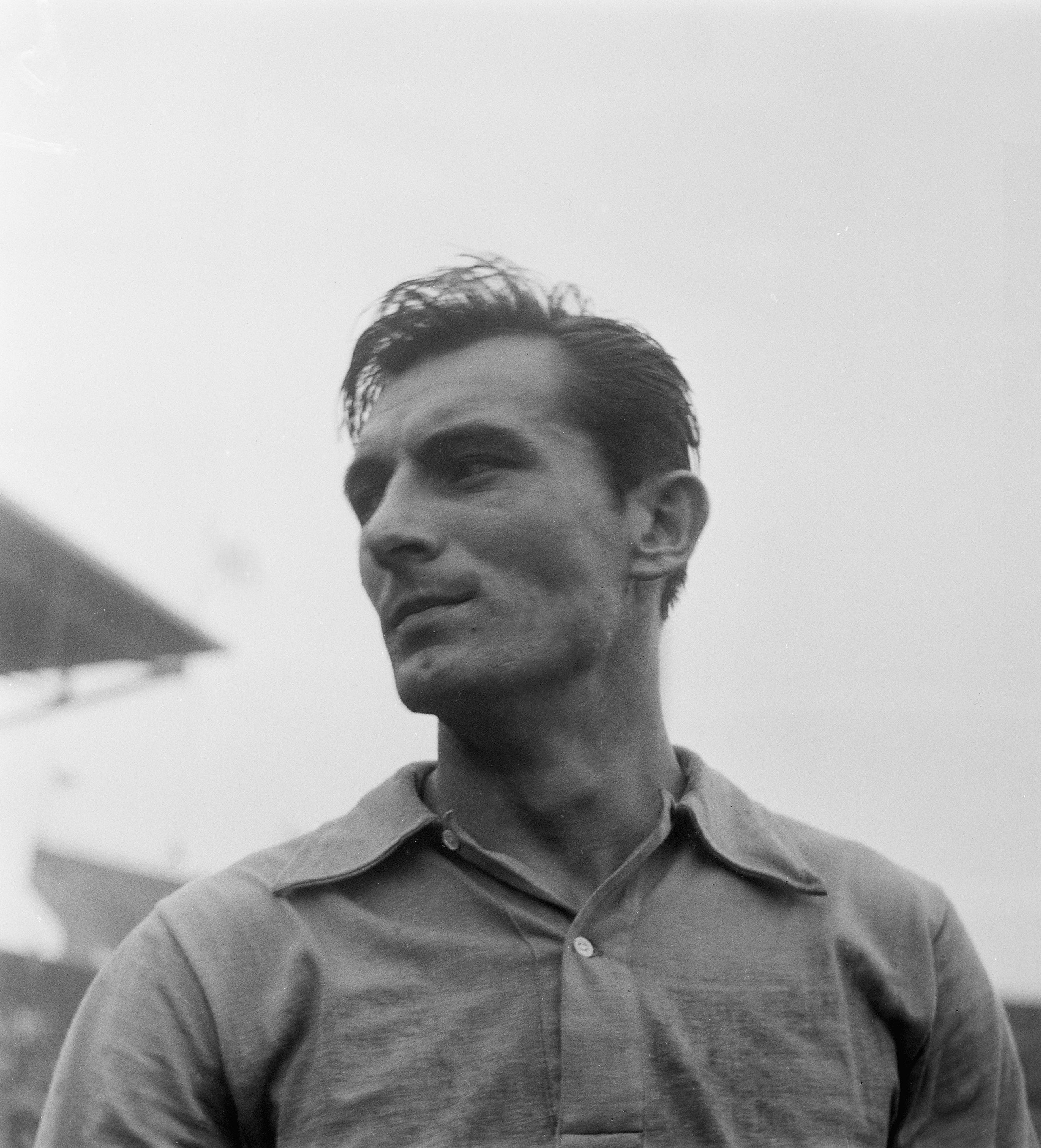 Branko Zebec. Betreft demonstratiewedstrijd van Fifa-elftal tegen CF Barcelona in Olympisch stadion op 30 september 1953